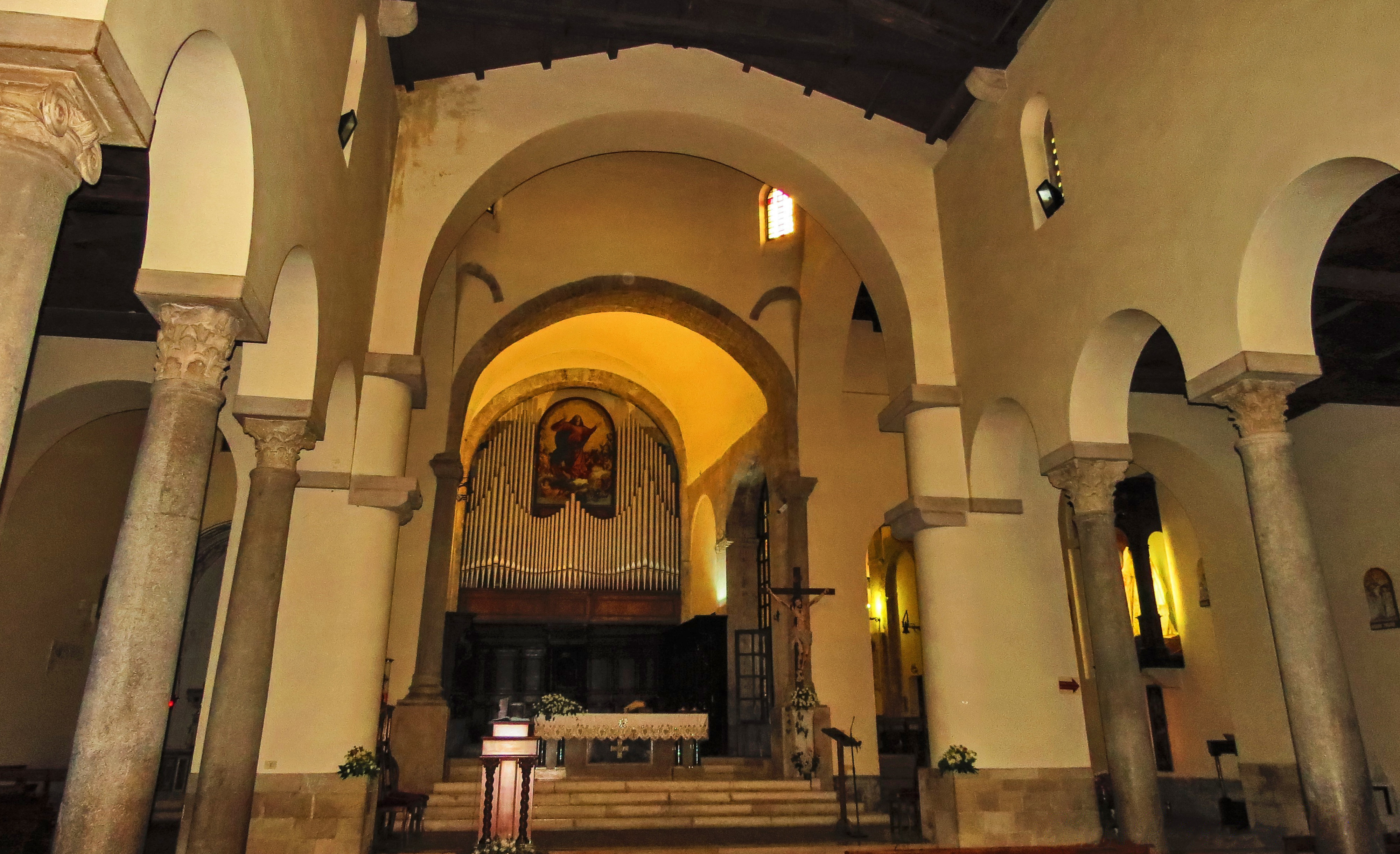 Interno della Concattedrale di Santa Maria Assunta, Bovino (FG)